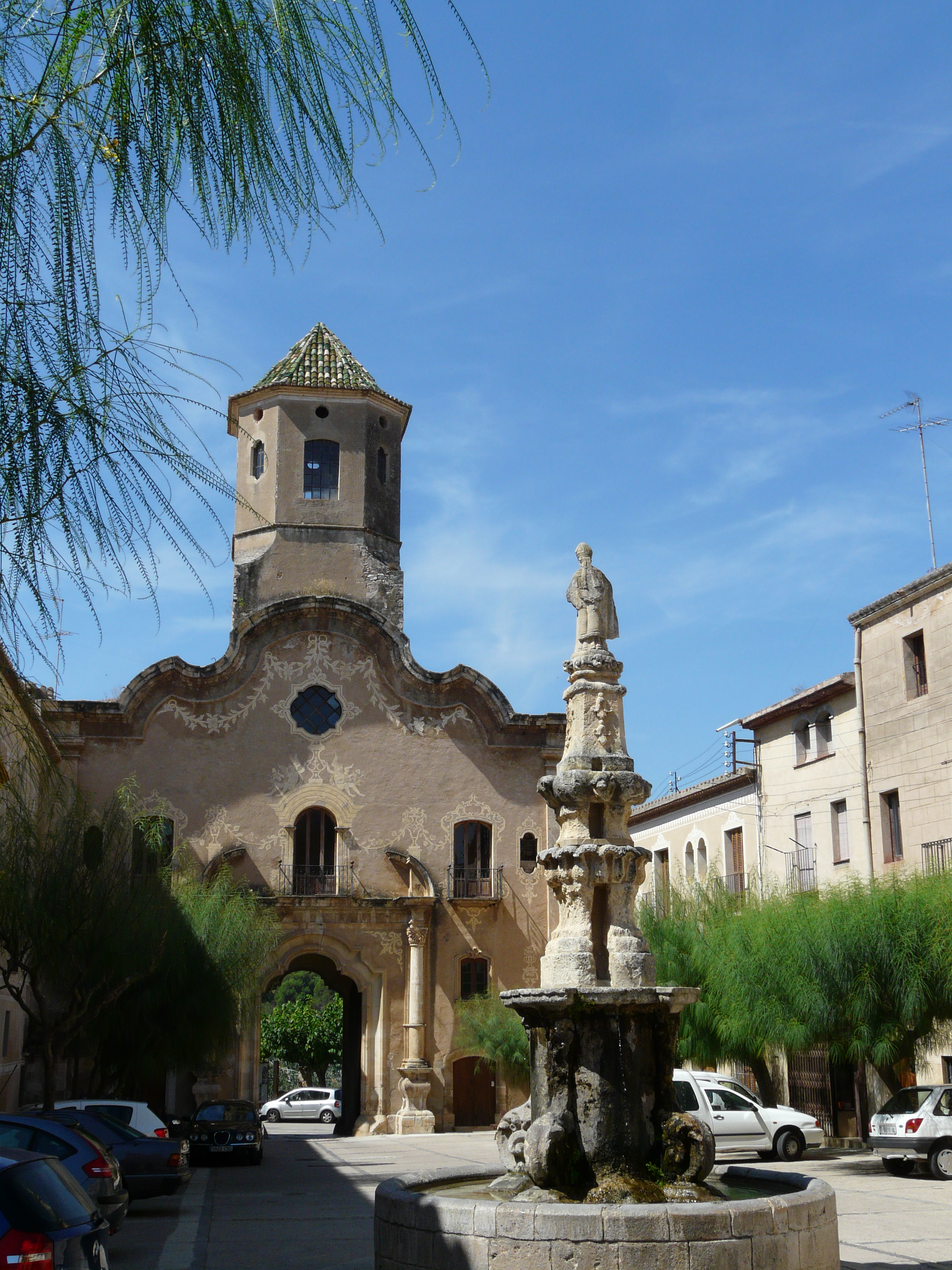 Font de Sant Bernat Calbó. Santes Creus (Aiguamúrcia). Object location41° 20′ 46.93″ N, 1° 21′ 46.55″ E